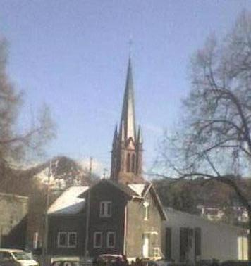 Katholische Kirche Siegen-Weidenau, links im Hintergrund die im Siegerland "Monte Schlacko" genannte Abraumhalde der Hüttentaler Stahlwerke